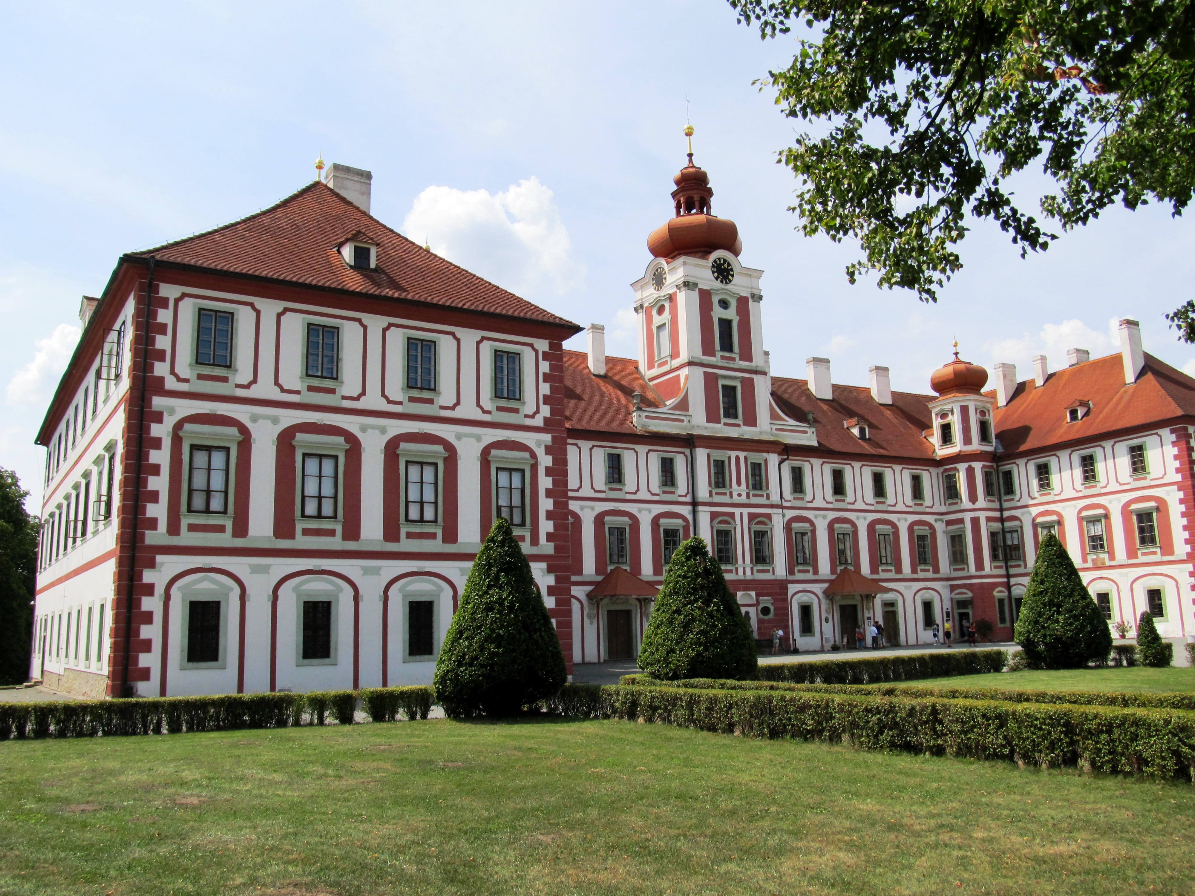 Zámek Mnichovo Hradiště